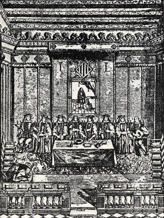 Interior de la Cambra Daurada de la Casa de la Ciutat de València el 1672.